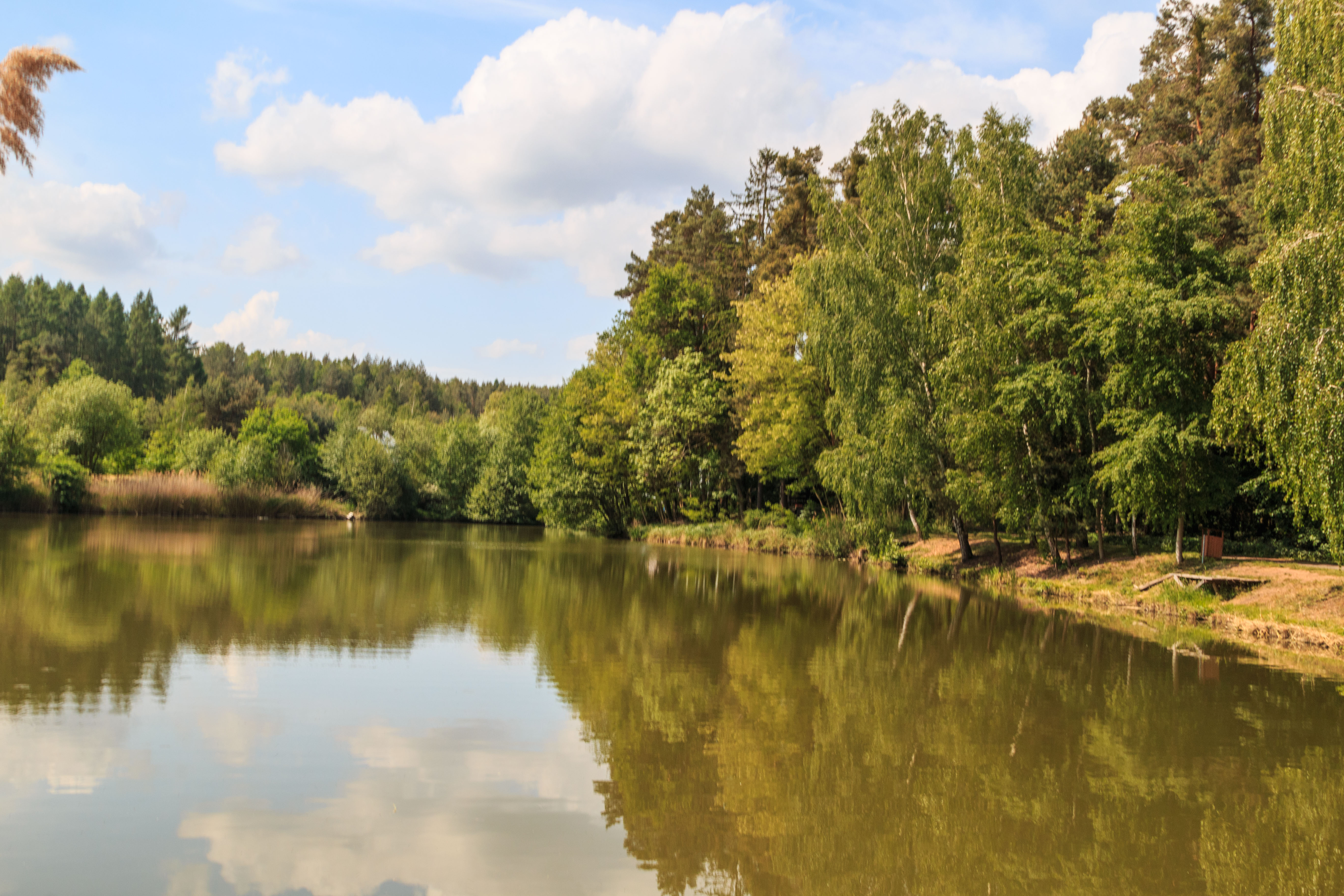 Senický rybník